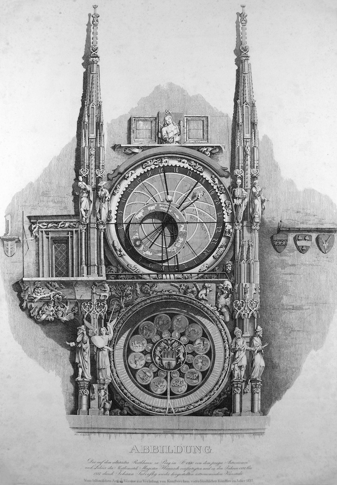 Prager Rathausuhr 1837, Stich vom V. Kandler nach Zeichnung vom A. Czermak.